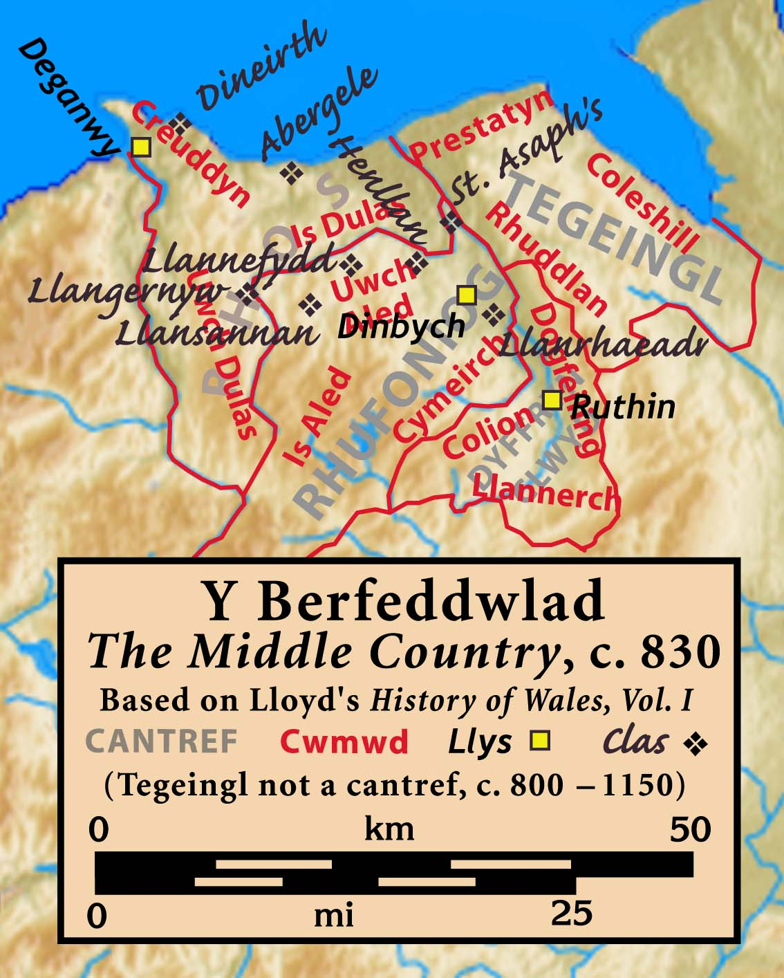 The Middle Country (Y Berfeddulad), c. 830